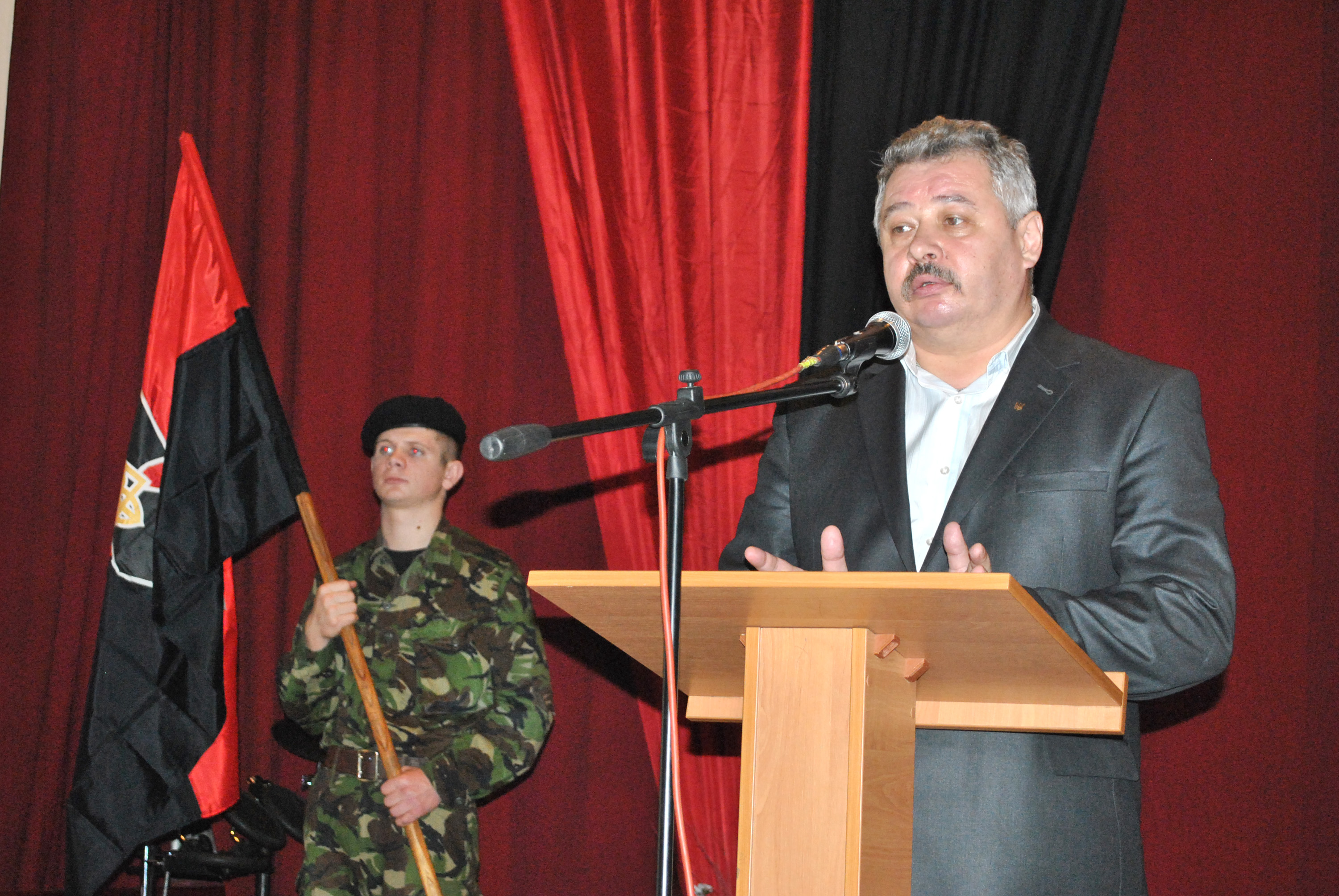 Урочини з нагоди 20-ої річниці «Тризубу» в Українському Домі «Перемога» (Тернопіль). Виступає Євген Філь.